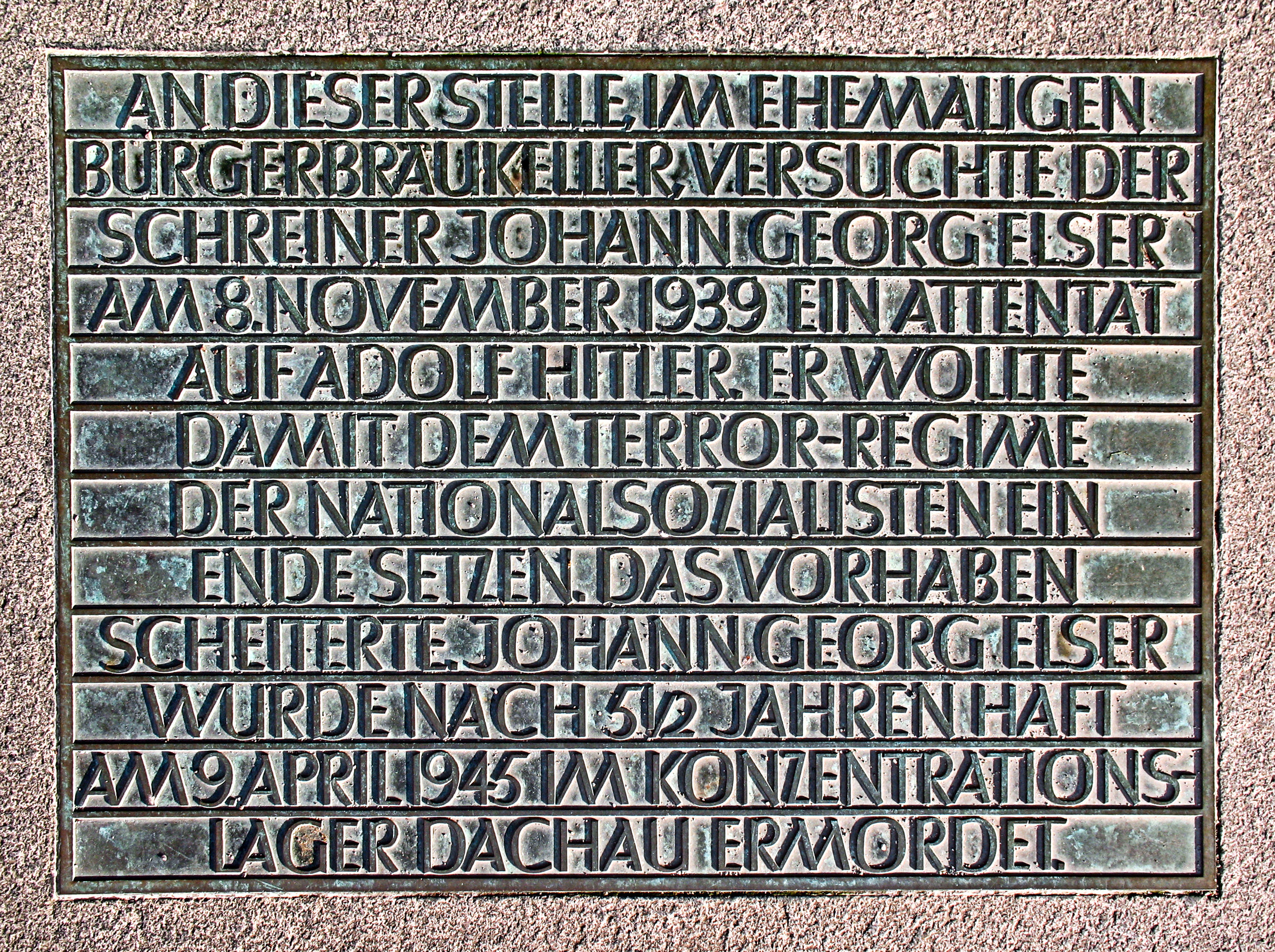 Gedenkplatte an Georg Elser. Genau an der historischen Stelle, an der die Säule im Bürgerbräukeller stand, in die er den Sprengstoff einbrachte.